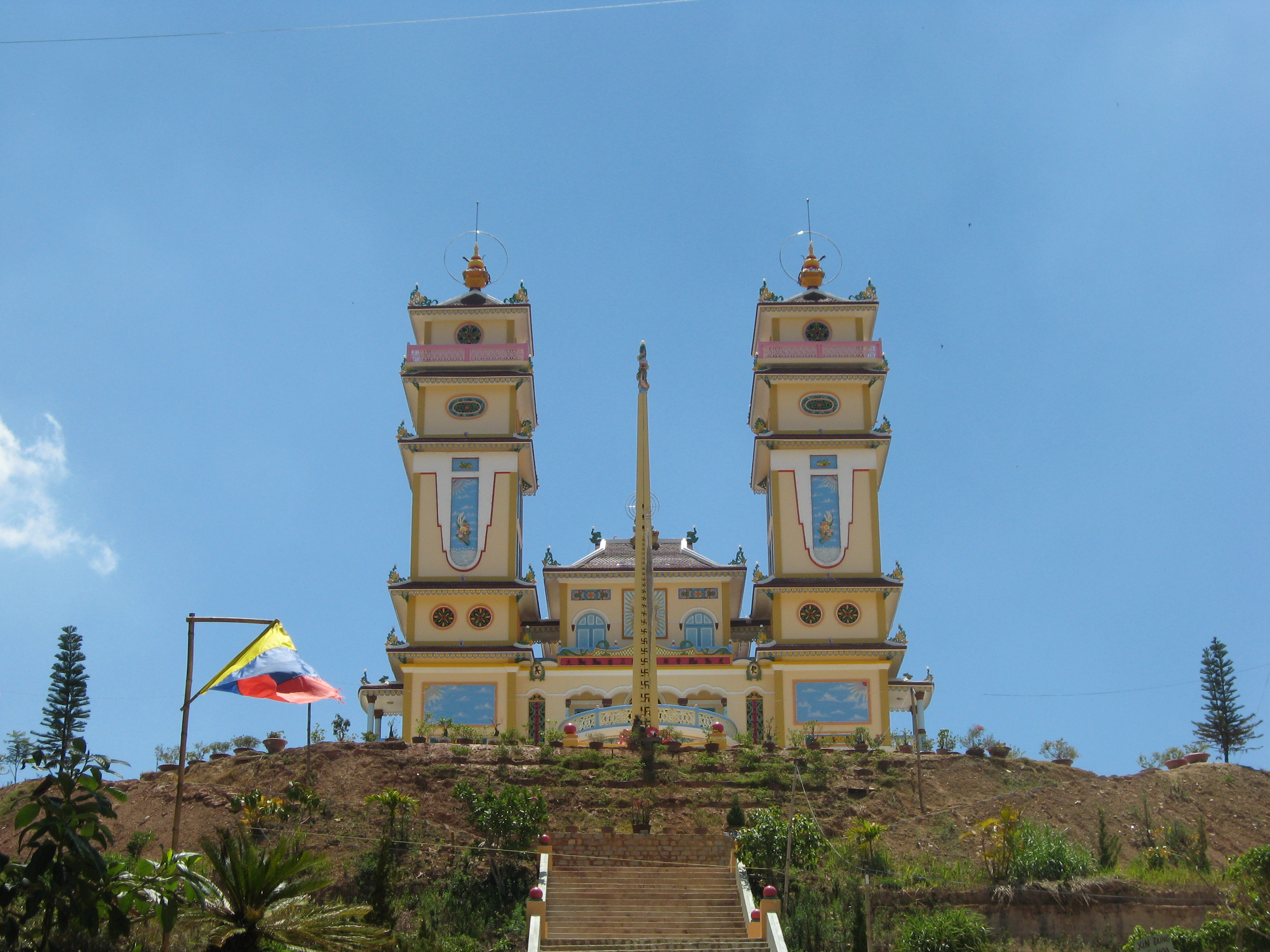 Thanh that Da Phuoc